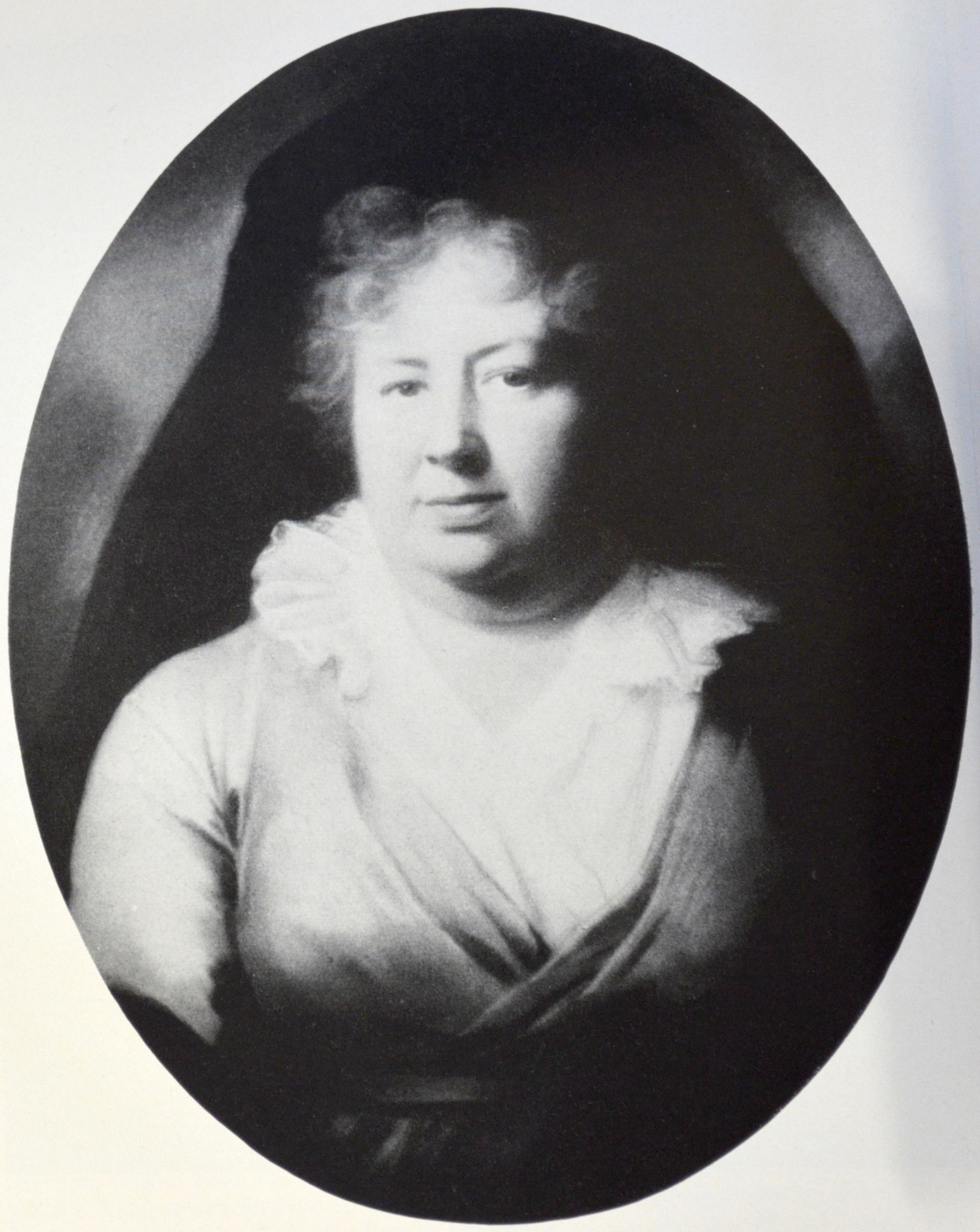 Friederike Charlotte Louise Riedesel Freifrau zu Eisenbach (* 11. Juli 1746 in Brandenburg; † 29. März 1808 in Berlin), geb. von Massow, war die Ehefrau des braunschweig-wolfenbüttelschen Generals Friedrich Adolf Riedesel.